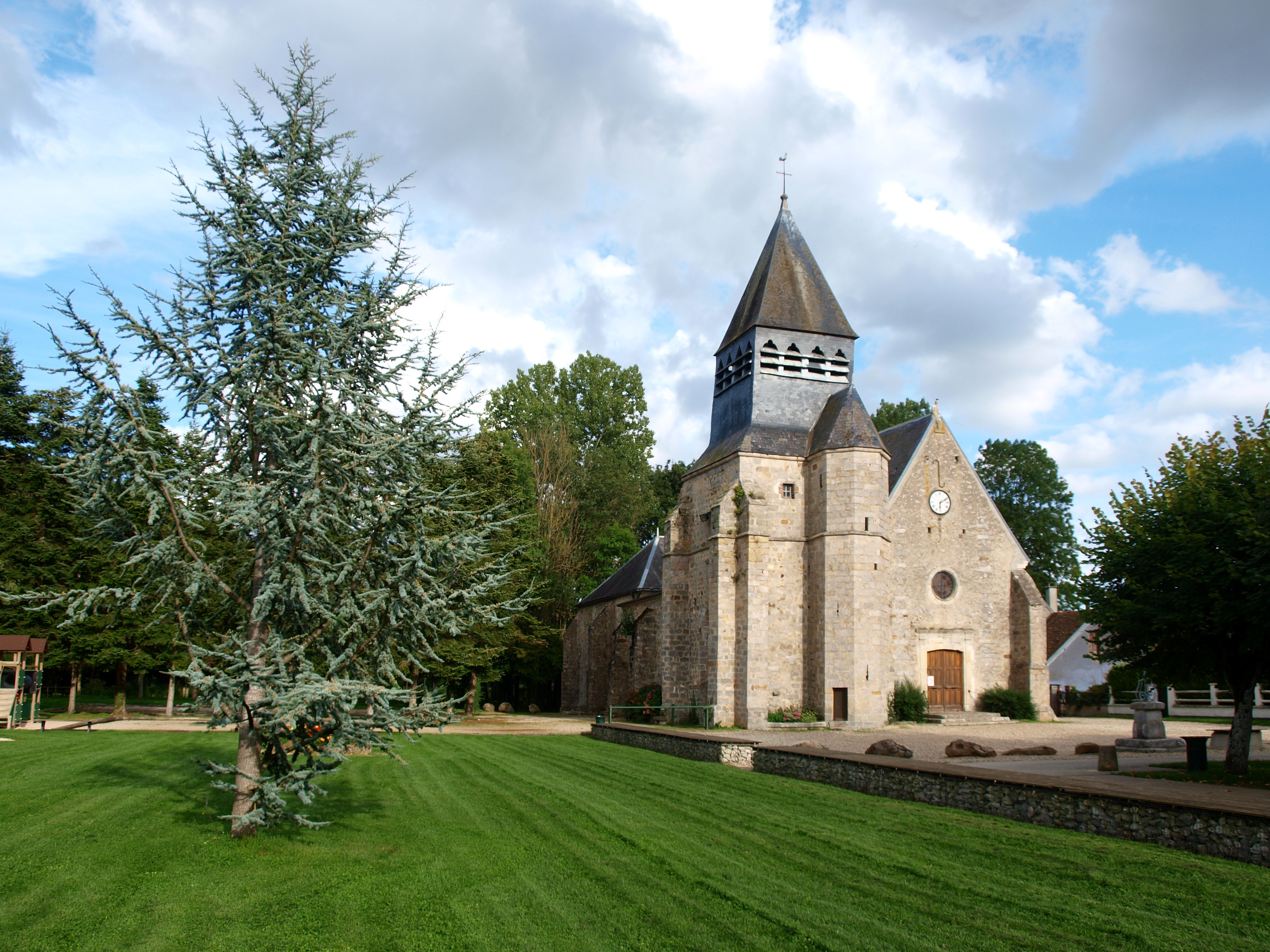 La Chapelle-sur-Oreuse (Yonne, France)